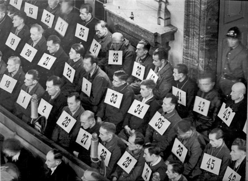 Illus- Gerichtsprozess in Rastatt über deutsch-faschistische Kriegsverbrecher. In Rastatt, 12 km von Baden-Baden, begann im Dezember 1946 die Gerichtsverhandlung gegen die deutsch-faschistischen Kriegsverbrecher. Sie stehen vor dem französischen Gerichtstribunal. Auf der Anklagebank sitzen insgesamt 550 faschistische Henker, frühere Aufseher und Angestellte in KZ-Lagern für Kriegsgefangene, die den Tod von über 25.000 Menschen verschulden. Als Zeugen wurden bei dem Prozeß die Überlebenden der KZ-Lager Auschwitz und Dachau vernommen. Sie erzählten dem Gericht und der Welt die ungeheuren Verbrechen, die von der Hitlerbande an unschuldigen Opfern verübt wurden. Sie erzählten von Tausenden zu Tode gequälten und umgebrachten Menschen. Auf dem Bild: Die Angeklagten im Gerichtssaal. Neg. Nr. V 2838